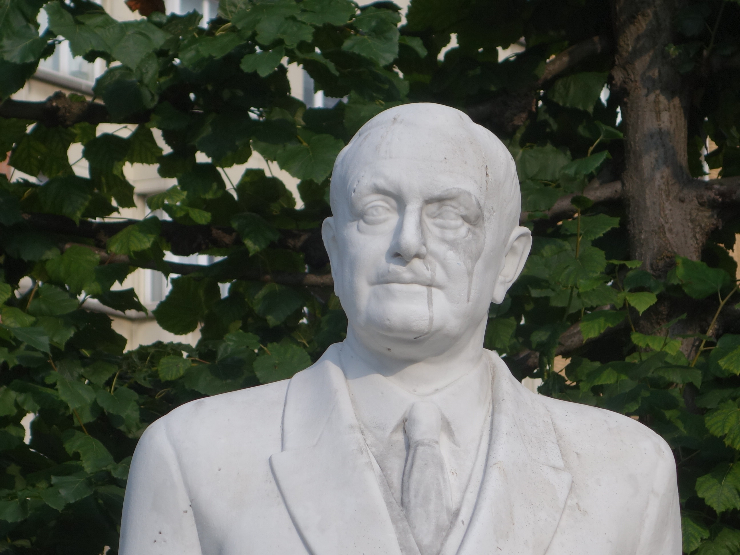 Buste van Albert Devèze (1881–1959) door Marcel Rau (1952). Albert Devèzesquare, Elsene